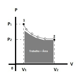 Gráfico PV